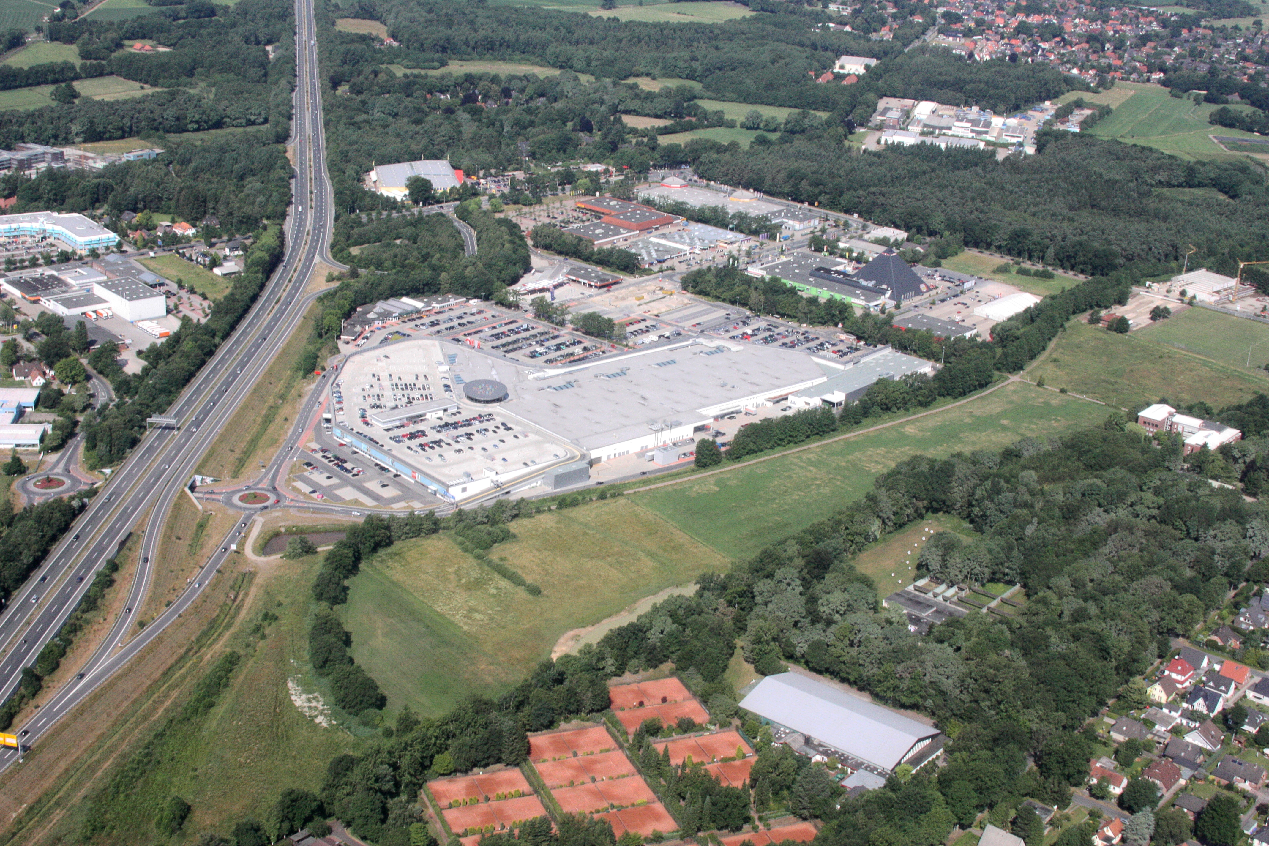 Luftaufnahmen Oldenburg (Oldenburg), mit Weiterflug nach Westen; 1500 Fuß Flughöhe; Juli 2010; Originalfoto bearbeitet: Tonwertkorrektur und Bild geschärft mit Hochpassfilter